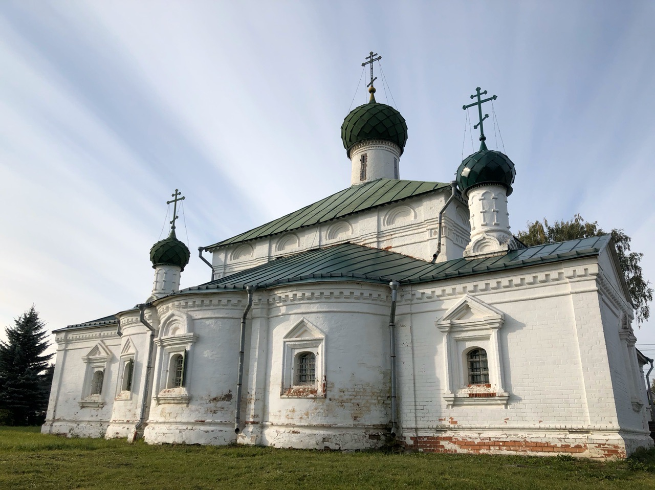 Церковь Христа Рождества на Городище